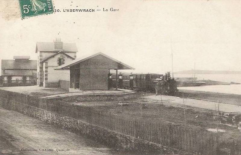 La gare des Chemins de Fer Départementaux du Finistère de l'Aber-Wrac'h